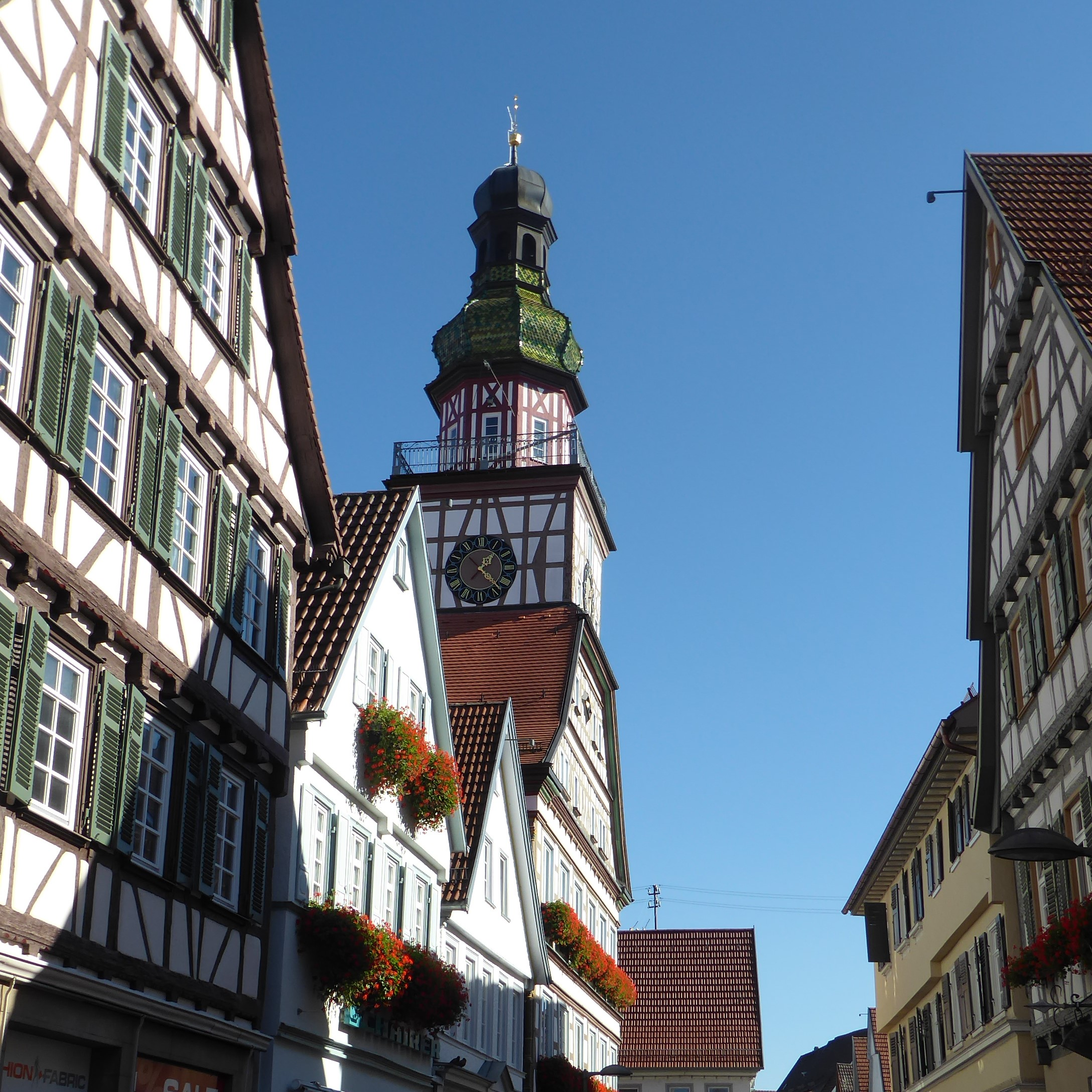 Kirchheim unter Teck Rathaus Altstadt